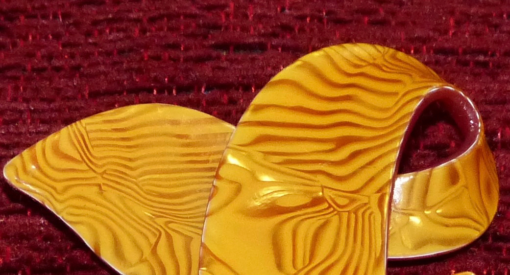 Laminiertes Celluloseacetat für die dreidimensionale Fuchs-Brosche von Léa Stein